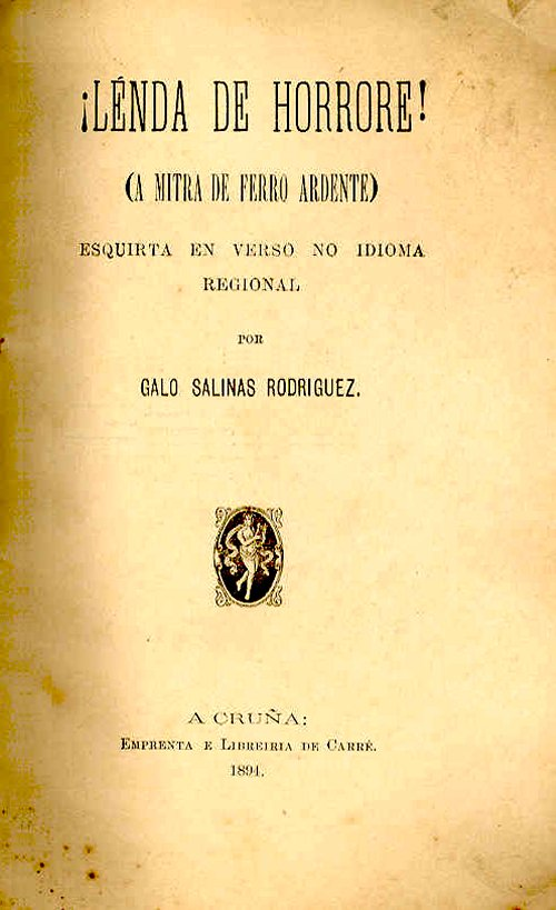 Mitra de ferro ardente, (burning crow), 1894, Galo salinas. Local legend of Monforte de Lemos